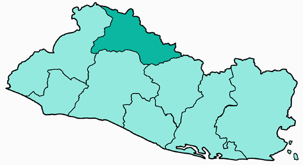 Mappa della diocesi cattolica di Chalatanango, in El Salvador. Lavoro personale eseguito a partire da questa immagine di Commons. Fonte per i confini delle diocesi: * Categoria:Chiesa cattolica in El Salvador